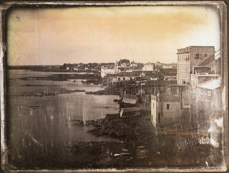 Una de las imágenes más antiguas de la ciudad de Buenos Aires, Argentina. Es un daguerrotipo de la ribera sur del Río de la Plata, tomada desde el Fuerte de Buenos Aires. Sobresale hacia la derecha el edificio del Molino Harinero San Francisco, una de las construcciones más altas y con mayores plantas de la ciudad en ese momento.